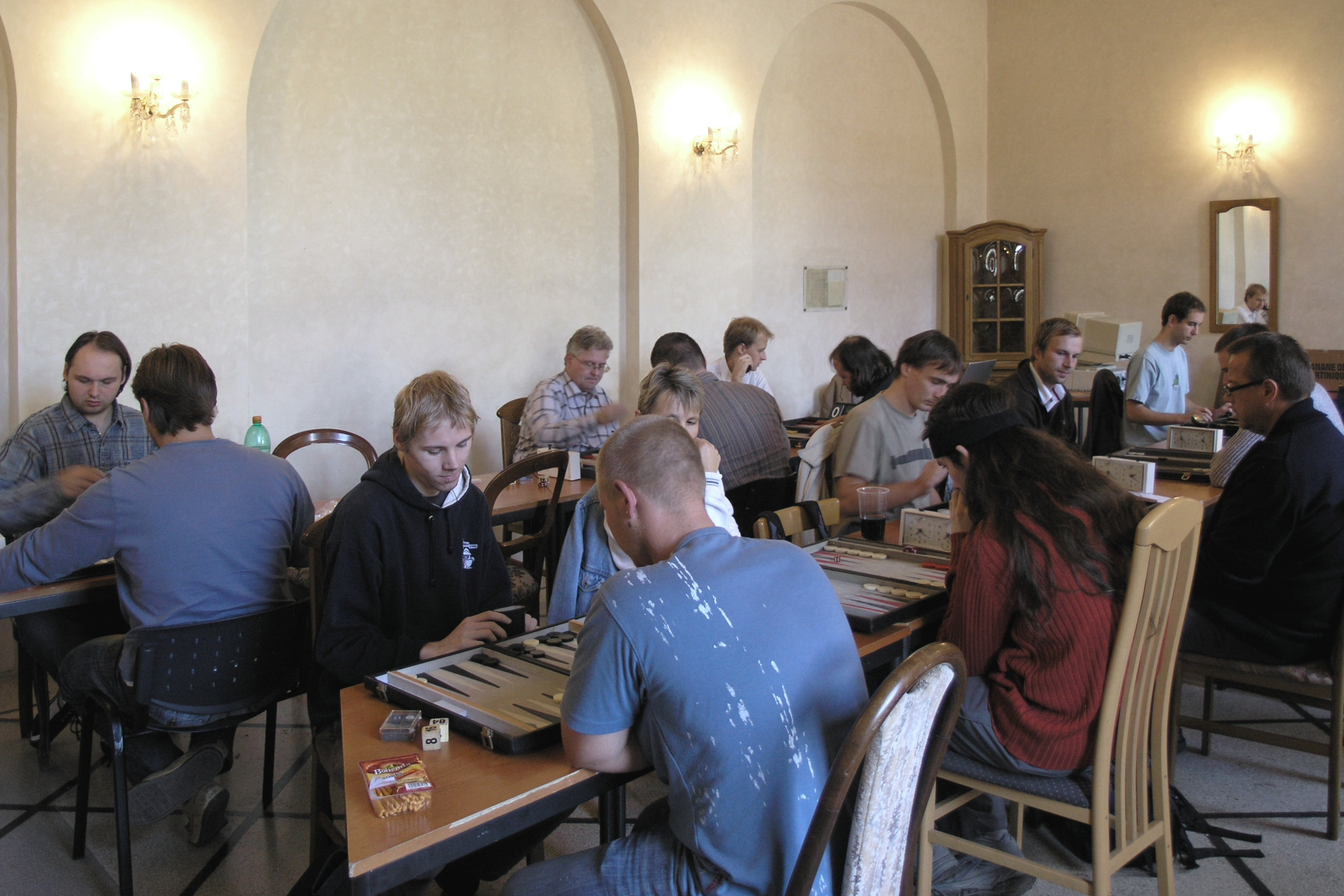 Deskohraní 2008 - turnaj ve Vrhcábech